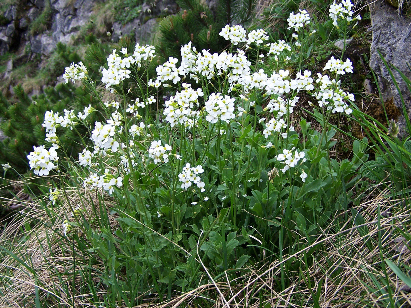 Arabis alpina (pl. gęsiówka alpejska), habitat: Tatra Mountains, Hala Upłaz